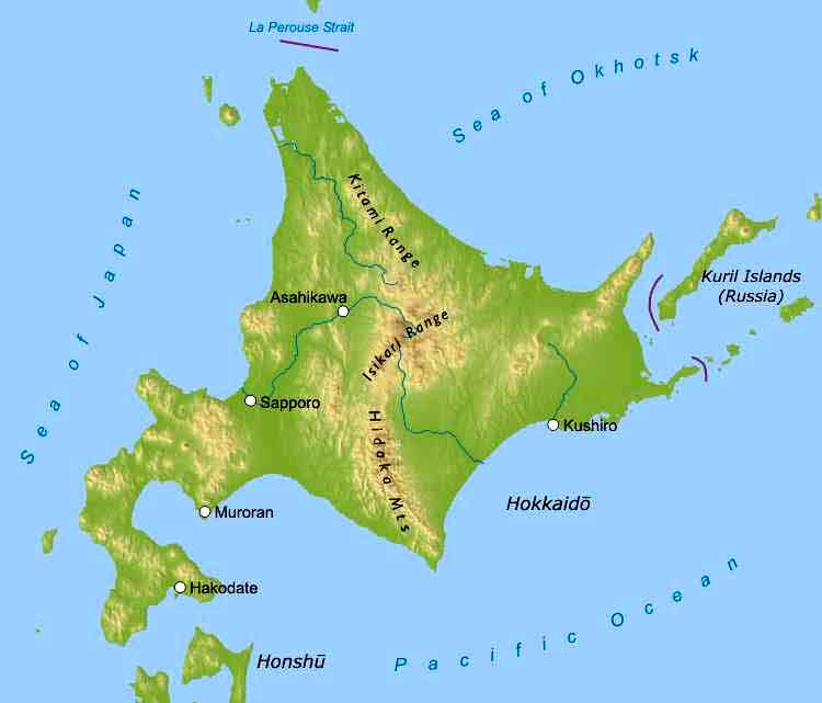 A map of Hokkaido